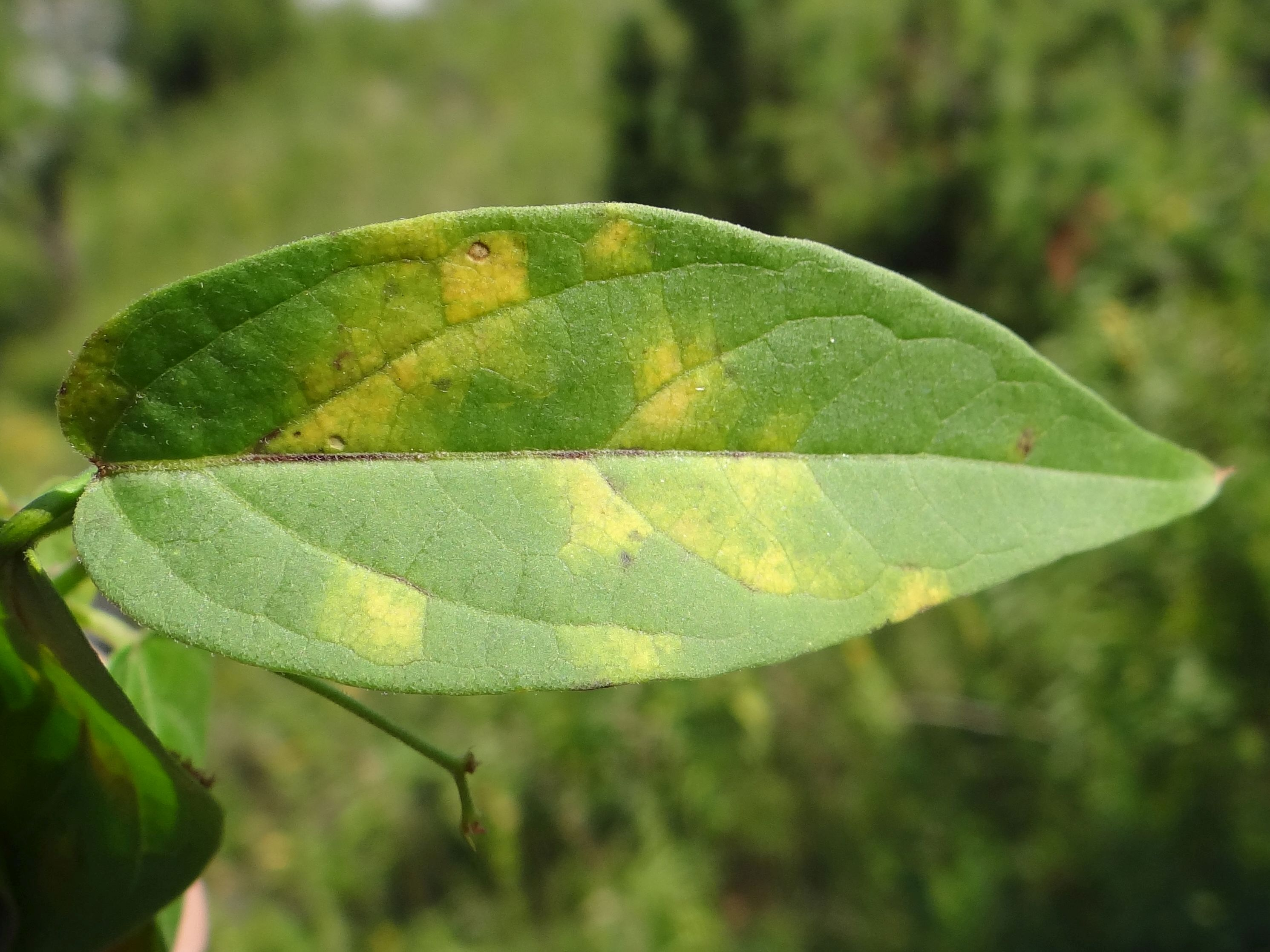 Cronartium pini on leaf Vincetoxicum hirundinaria. Location: Poland, Wyżyna Karakowsko-Częstochowska, Łysa Pałka